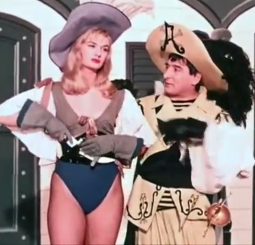 fotogramma dal film Alvaro piuttosto corsaro del 1955